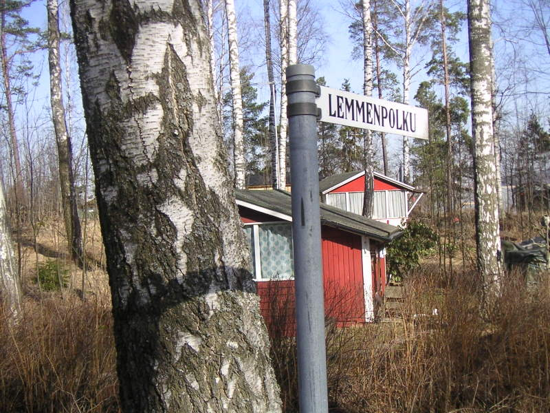 A street sign in Kivinokka